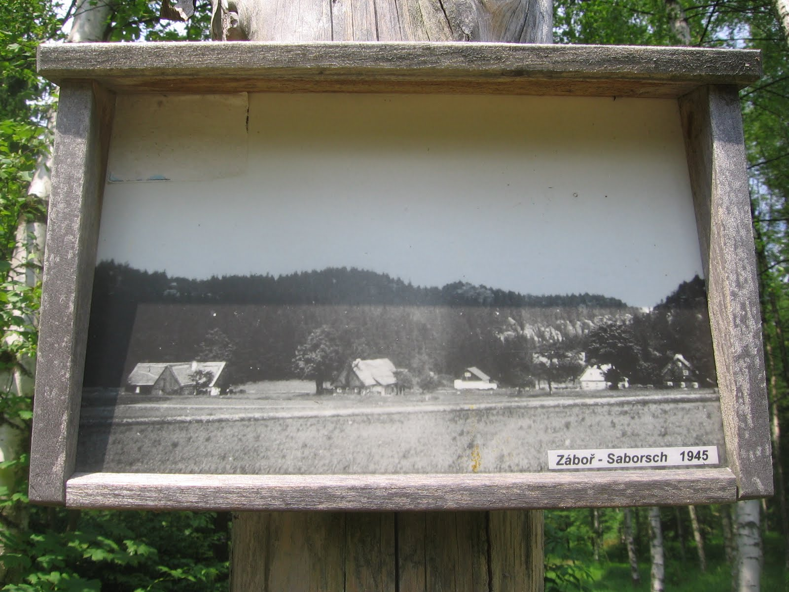 Dobová fotografie dnes zaniklé osady Záboř na rozcestníku